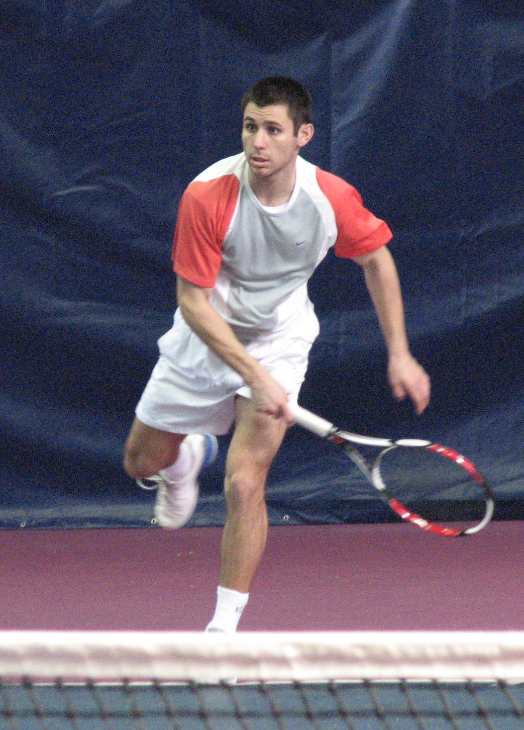 Петър Трендафилов, Държавно първенство по тенис в зала, 2010 г.